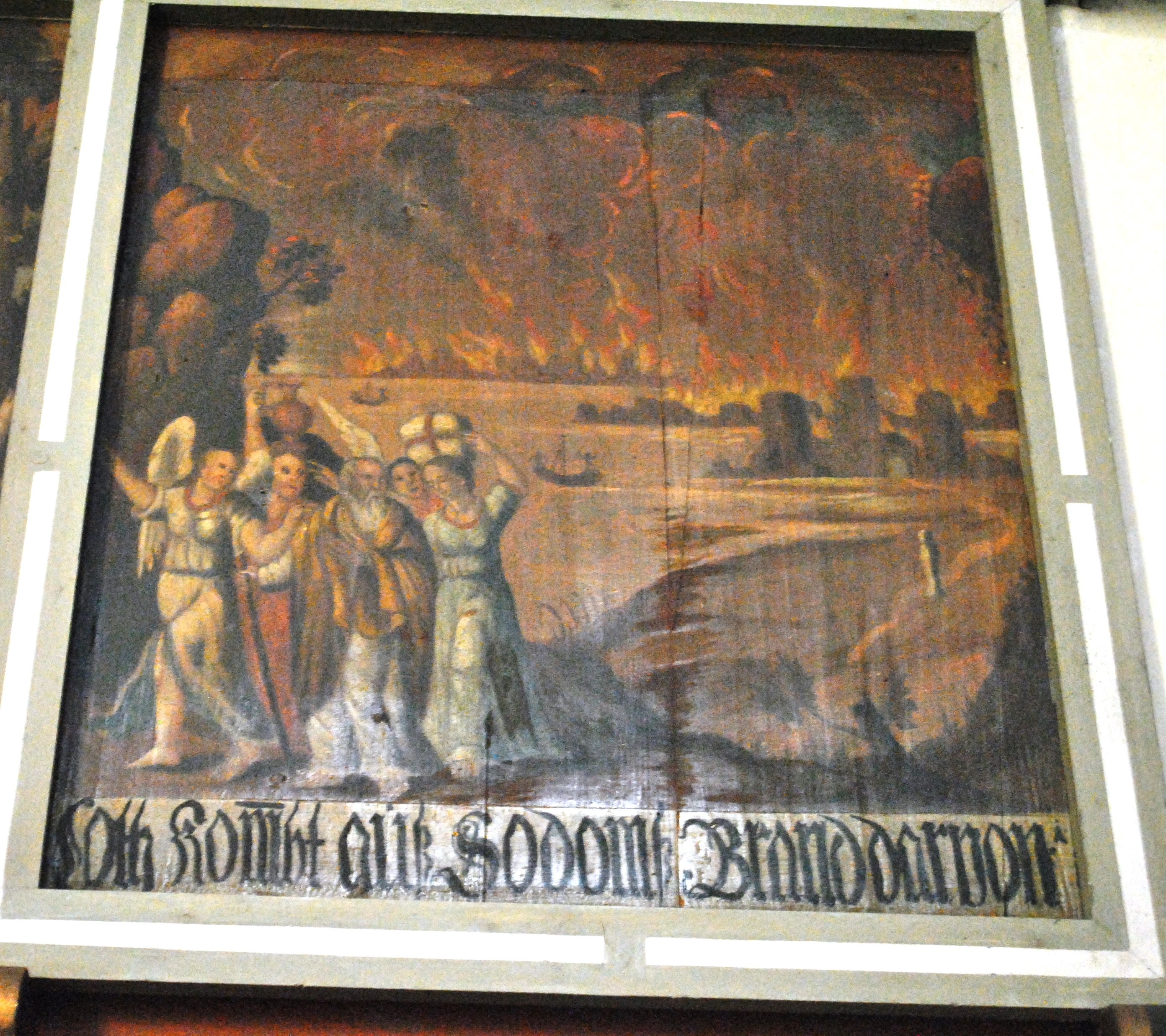 Armenbibel, Empore St. Nikolai Marktbreit, Altes TestamentThis is a photograph of an architectural monument.